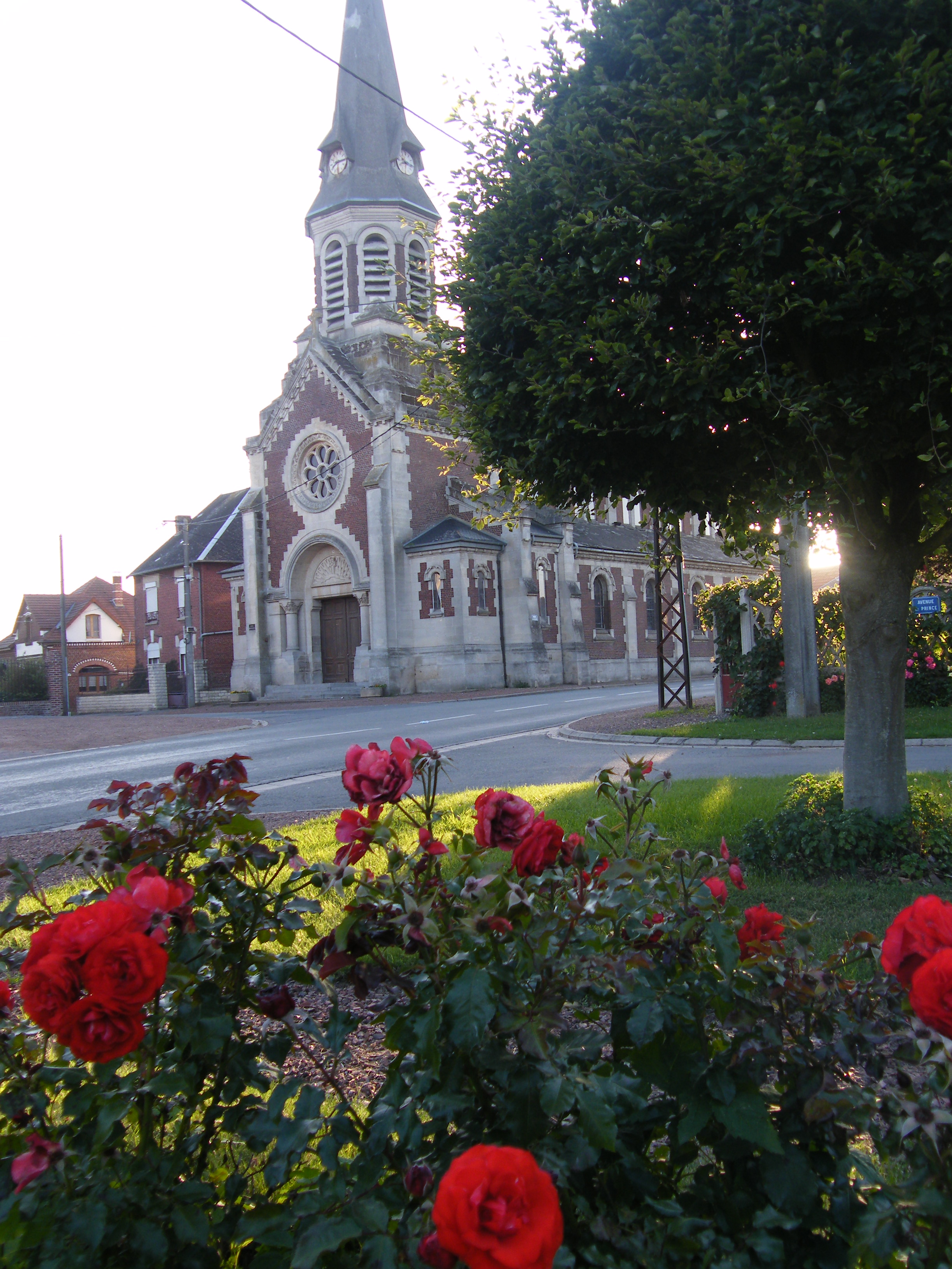 Église de Metz-en-Couture (Pas-de-Calais, France.